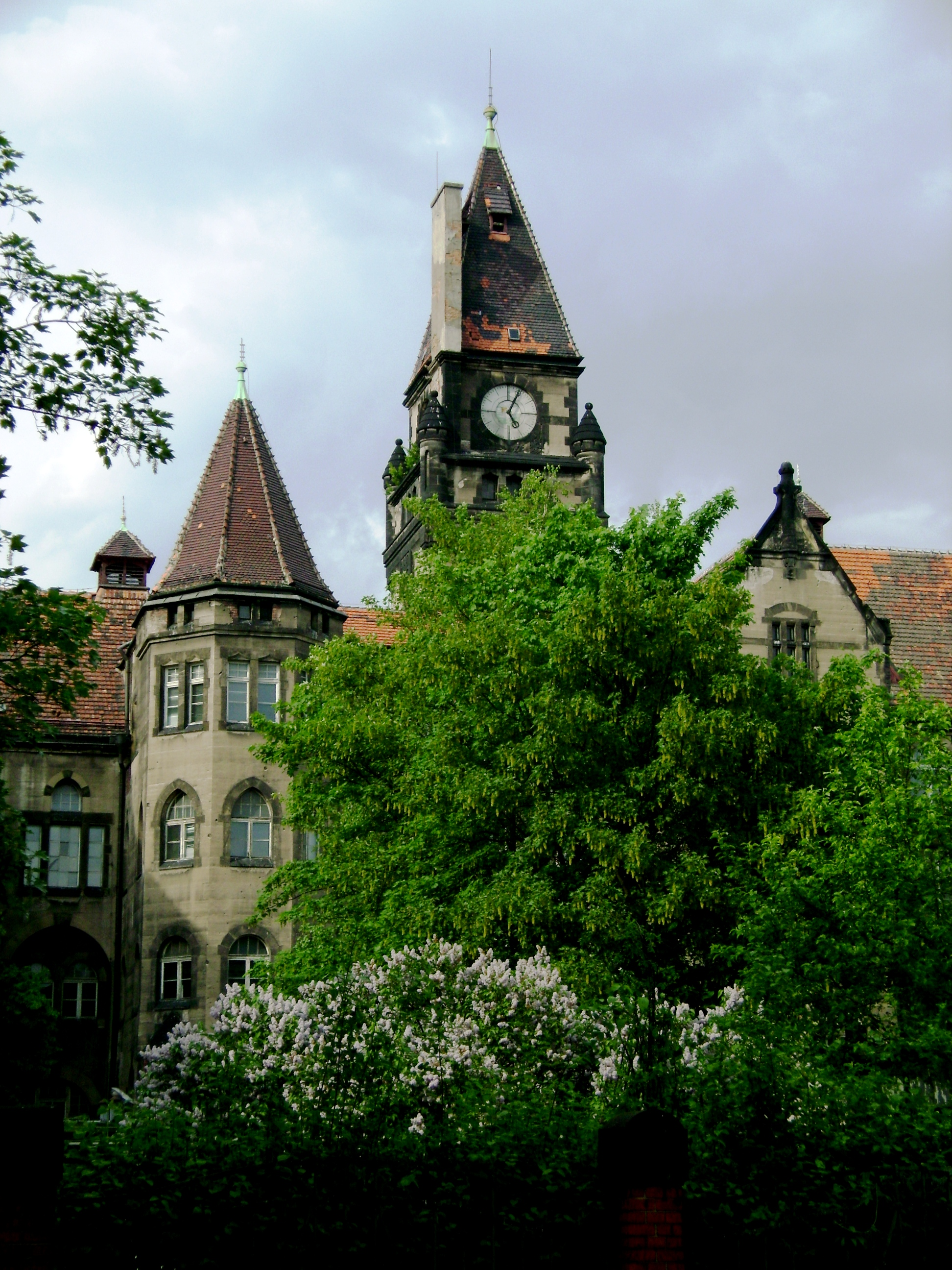 Wydziału Architektury (W-1) Politechniki Wrocławskiej zapoczątkował działalność w 1945 roku jako Wydział Budownictwa. Katedry uruchomione na tym wydziale w 1946 roku zostały połączone w dwa oddziały: Architektury oraz Inżynierii Lądowej. Pierwszego września 1949 roku Oddział Architektury został przekształcony w samodzielny Wydział Architektury. Obecnie zajęcia dydaktyczne prowadzone są na dwóch kierunkach: Architektura i Urbanistyka oraz Gospodarka Przestrzenna.